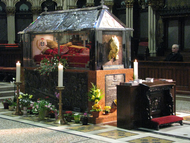 Sarkofag bl. Alojzija Stepinca u Zagrebačkoj katedrali, kojeg je izradio akademski kipar Hrvoje Ljubić. Ispod je grobnica zagrebačkih biskupa i nadbiskupa.